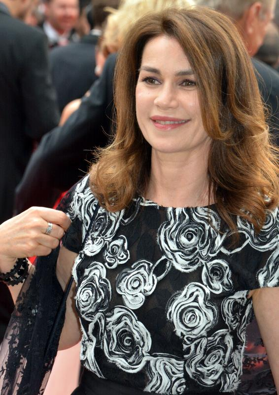 Valérie Kaprisky au festival de Cannes